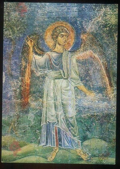 Фреска в „Света София“, Охрид. Ангел от сцената „Възнесение Господне“ на тавана.